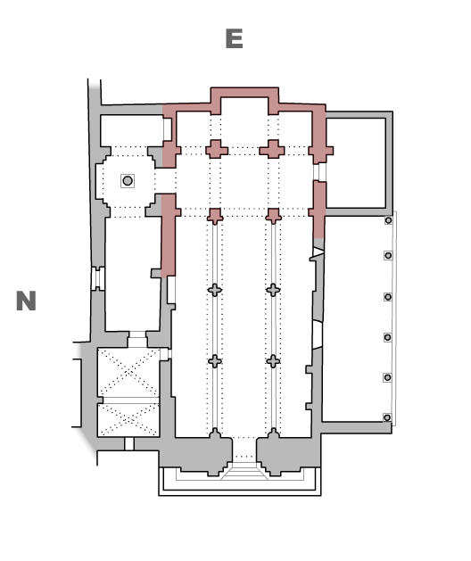 Planta de Santa María de Wamba